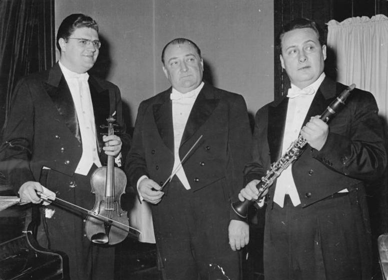 Zentralbild-CTK 1.6.57 Sc-I Erfolgreicher Auftritt deutscher Künstler auf dem "Prager Frühling 1957" Franz Konwitschny dirigierte Im Rahmen der zur Zeit in der tschechoslowakischen Hauptstadt stattfindenden internationalen Musikfestspiele "Prager Frühling" wurde ein Konzert des Prager Rundfunk-Sinfonieorchesters unter Leitung von Professor Franz Konwitschny zu einem großen Erfolg. Höhepunkt des Konzerts war die Aufführung von Carl Orffs Kantate "Carmina burana", die erstmalig in der CSR erklang. Professor Konwitschny, Chormeister Professor Kuehn, die tschechoslowakischen Vokalisten Subrtova, Votava, Srunar, sowie der Chor und das Orchester, die Orffs Werk als Ergebnis einer deutsch-tschechoslowakischen Zusammenarbeit in seiner vollen Schönheit erstehen ließen, wurden von dem internationalen Publikum stürmisch gefeiert. (Nähres siehe ADN-Meldung 25-74 v. 1.6.57) UBz: Während einer Konzertpause Von rechts. Klarinettist Oskar Michalik (DDR), der ebenfalls in dem Konzert auftrat, Professor Franz Konwitschny und der Violinist Josef Suk (CSR)."